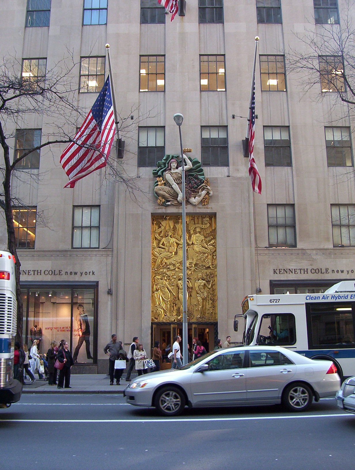 Façade de la Maison française, 5e Avenue, New York